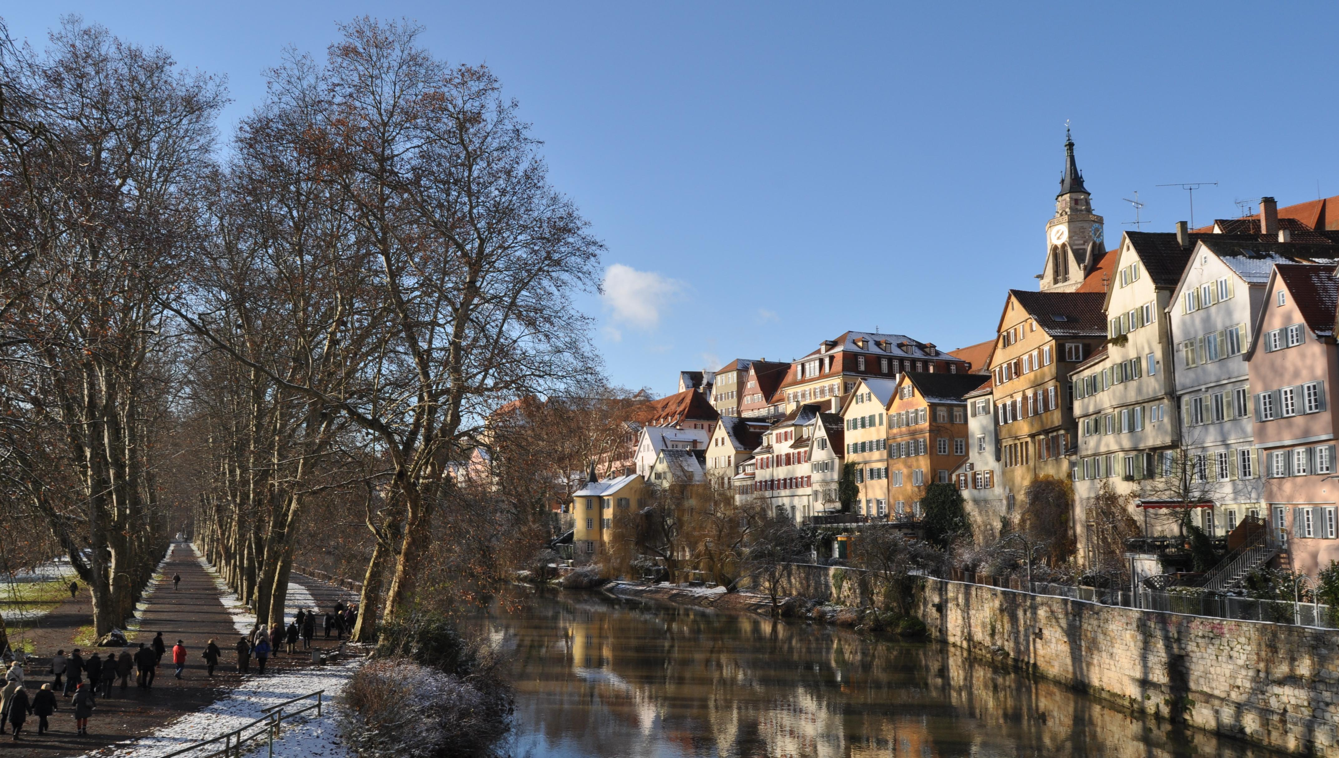 Tübinger Neckarinsel in Winter